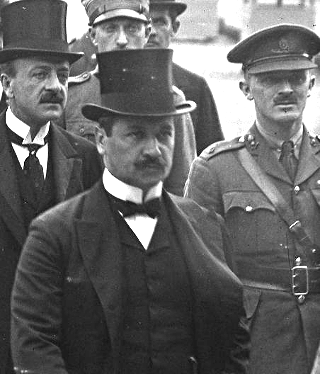 1920. június 4-én a magyar kormány képviseletében Benárd Ágost küldöttségvezető Drasche-Lázár Alfréd rendkívüli követ és államtitkár kíséretében megérkezik a békeszerződés aláírására a versailles-i Nagy Trianon kastélyba